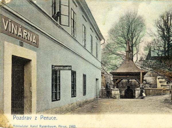 Dům židovské rodiny Rosenbaum z Peruce.